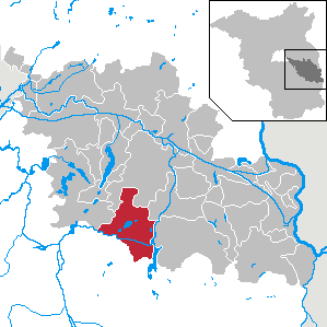 Tauche in Brandenburg (Country) - District Oder-Spree